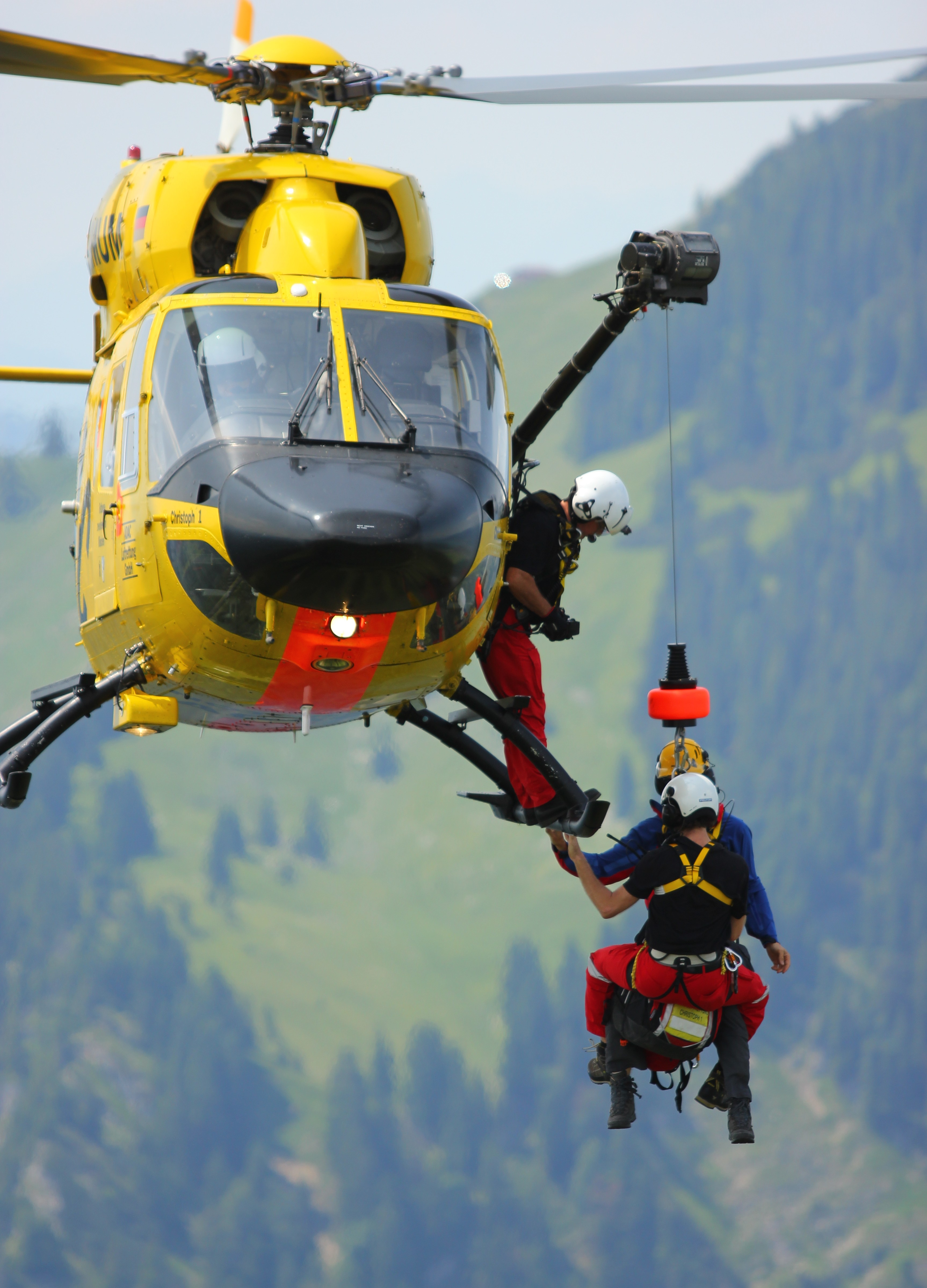 Bergrettung am Bodenschneid-Gipfel der 'Christoph 1', D-HMUM.